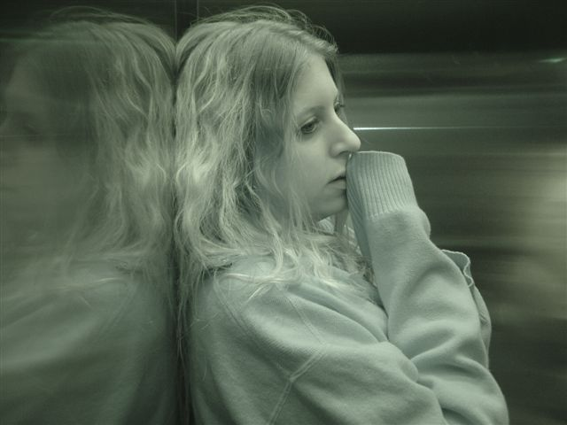 Ragazza pensosa, sola in ascensore